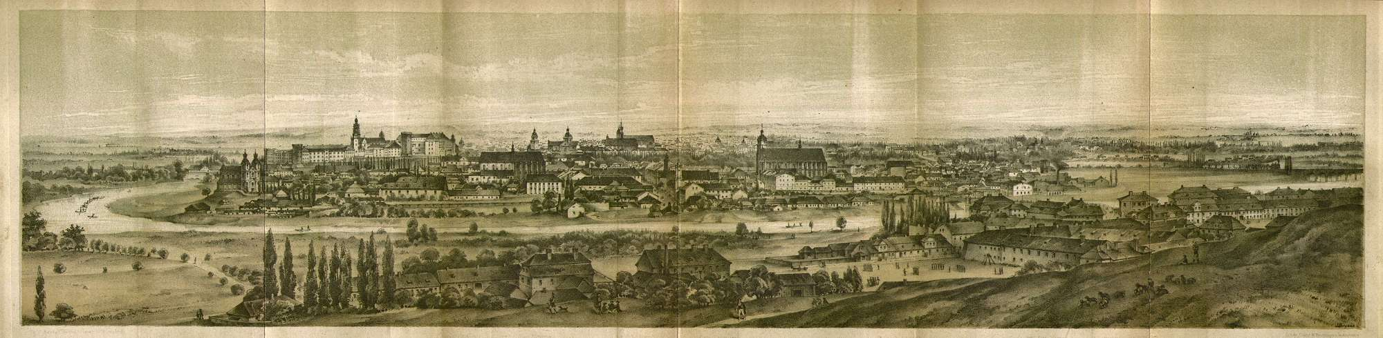 Widok Krakowa z Podgórza, 1860 Litografia z tintą; wym.: 141 x 592 mm; sygn. na płycie p.d.: J. Brydak. Grafika z przewodnika Ambrożego Grabowskiego "Kraków i jego okolice", Kraków 1860. Lit.: J. Banach, Dawne widoki Krakowa, Kraków 1983, s. 190.